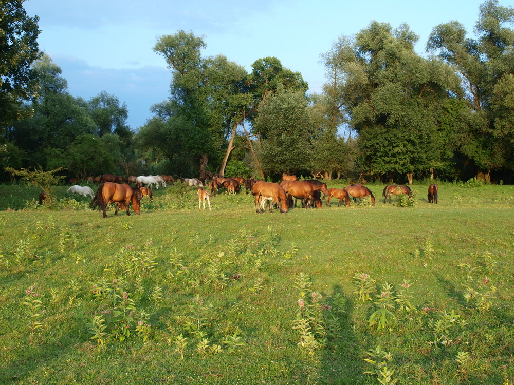 Konji u Nacionalnom parku Lonjsko Polje